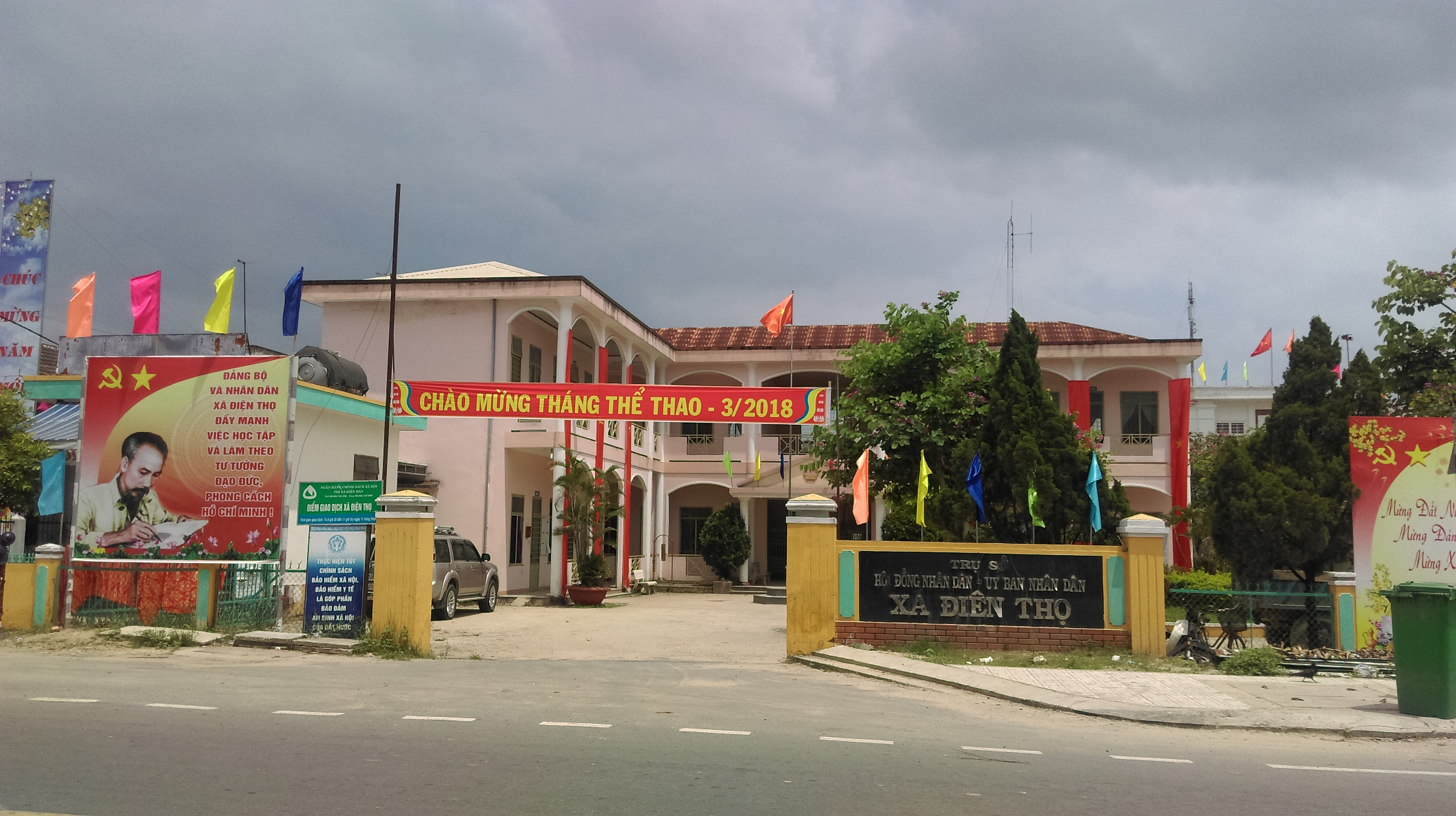 UBND xã Điện Thọ, Điện Bàn, Quảng Nam